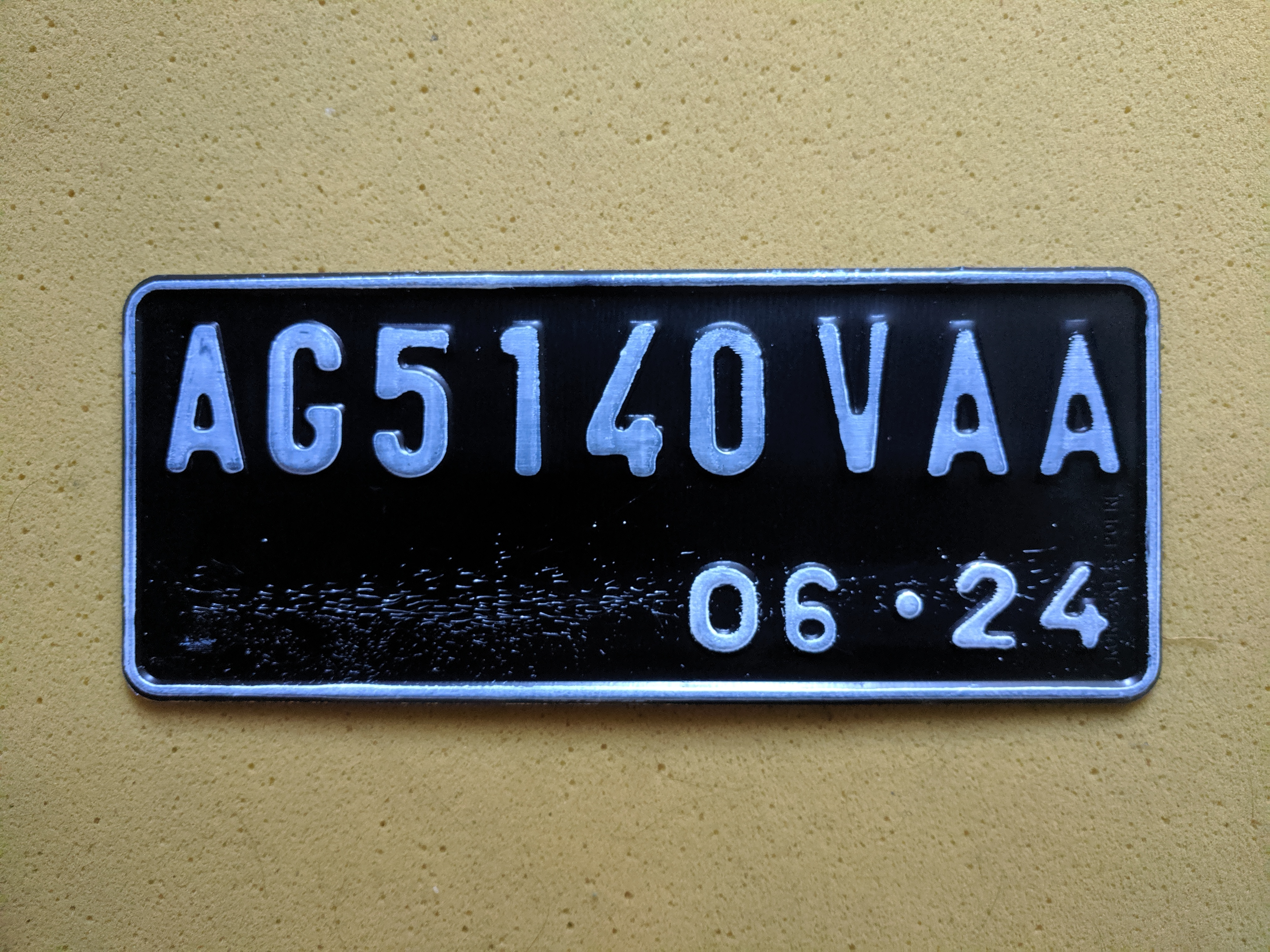 License Plate of Nganjuk Regency